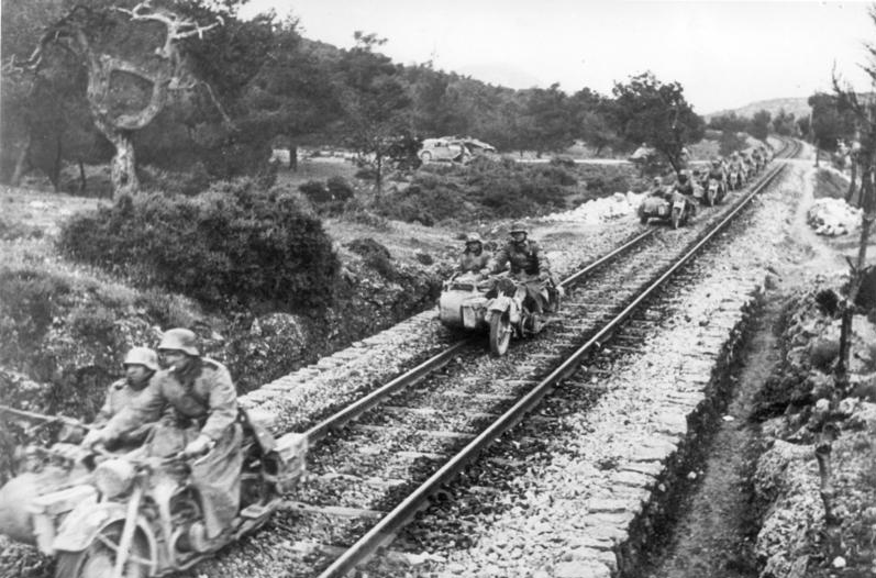 Wo die Wege in Griechenland fehlten, bot der Schienenstrang Ersatz. 3-5-41 [Herausgabedatum] FR.OKW PK-Jesse-Presse Hoffmann